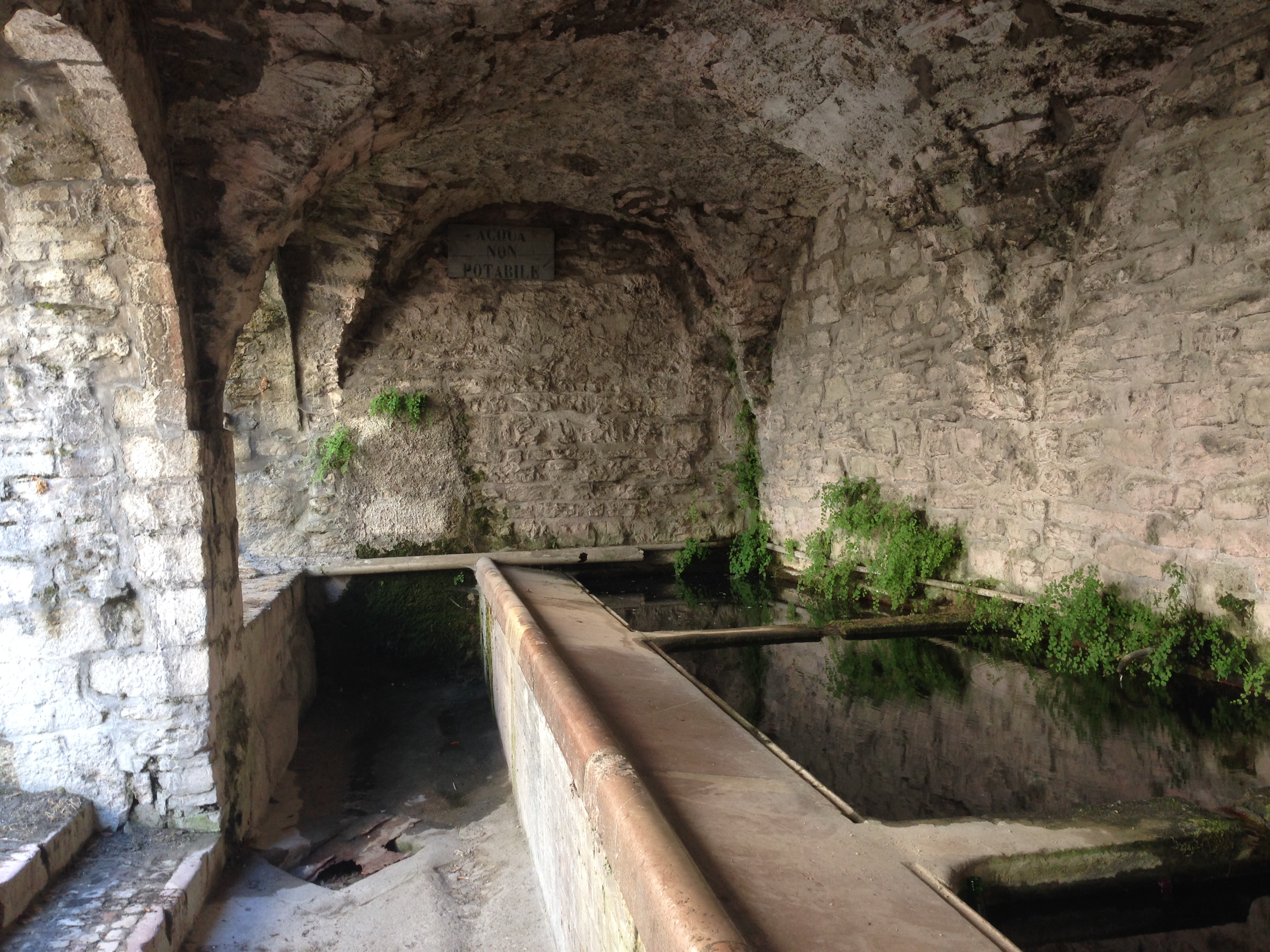 Lavatoio della Posterna. Spoleto